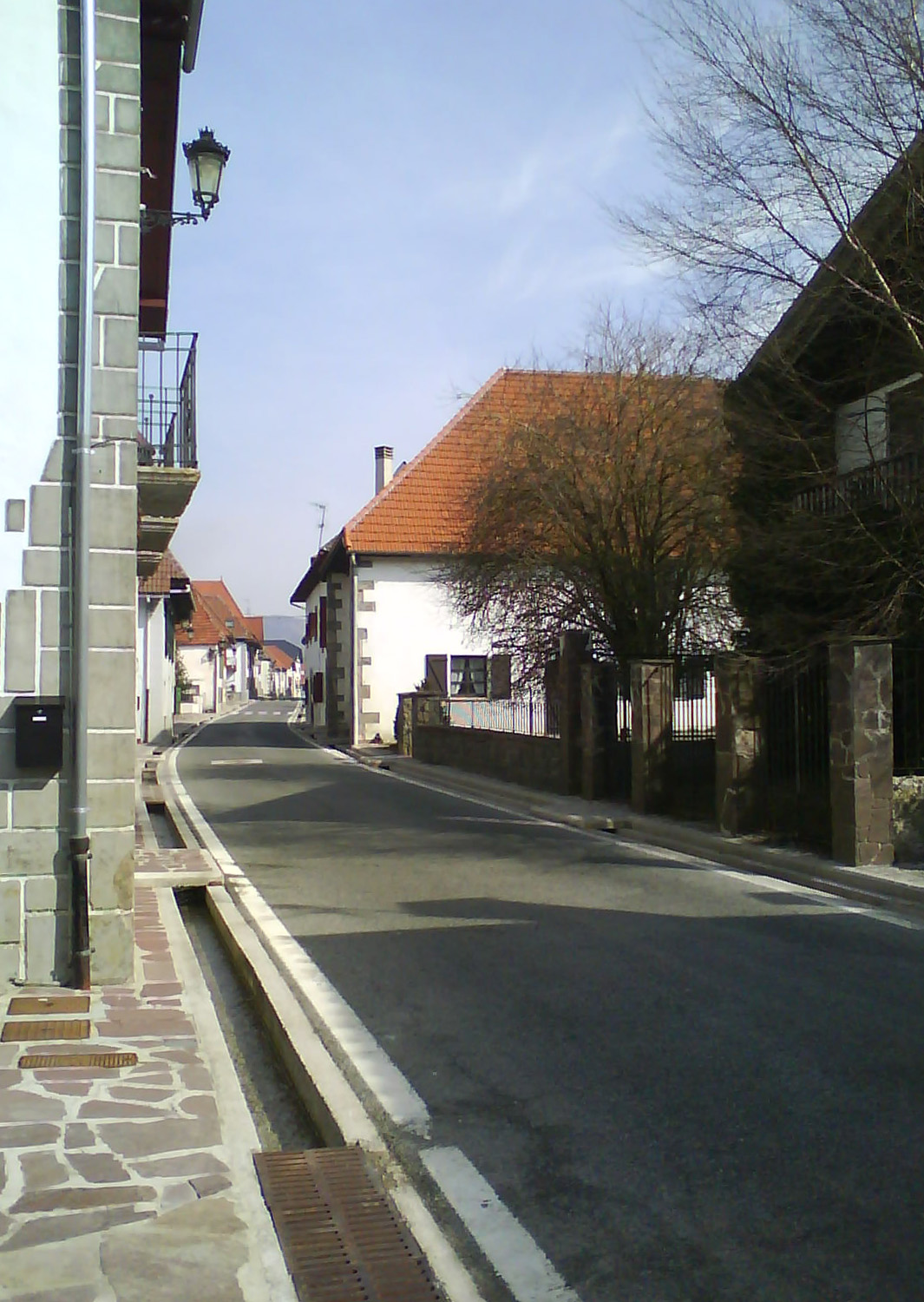 Aurizko kale nagusia Orregarantz begira.